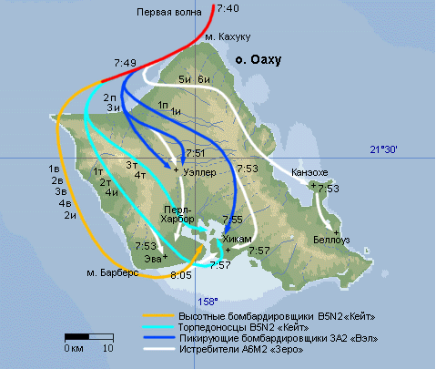 Схема первой волны японского авиаудара по Перл-Харбору